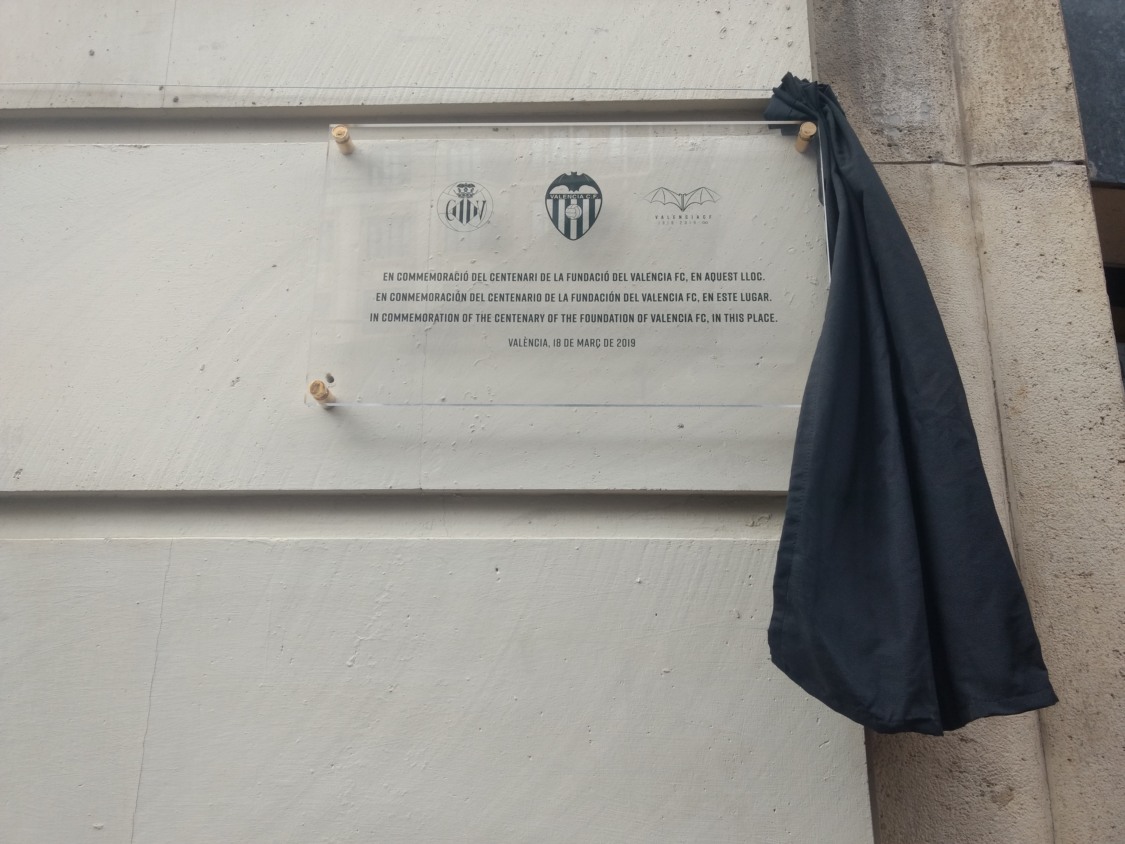 Placa en homenatge al Bar Torino, lloc fundacional del València CF, inaugurada el dia de la celebració del Centenari del València CF